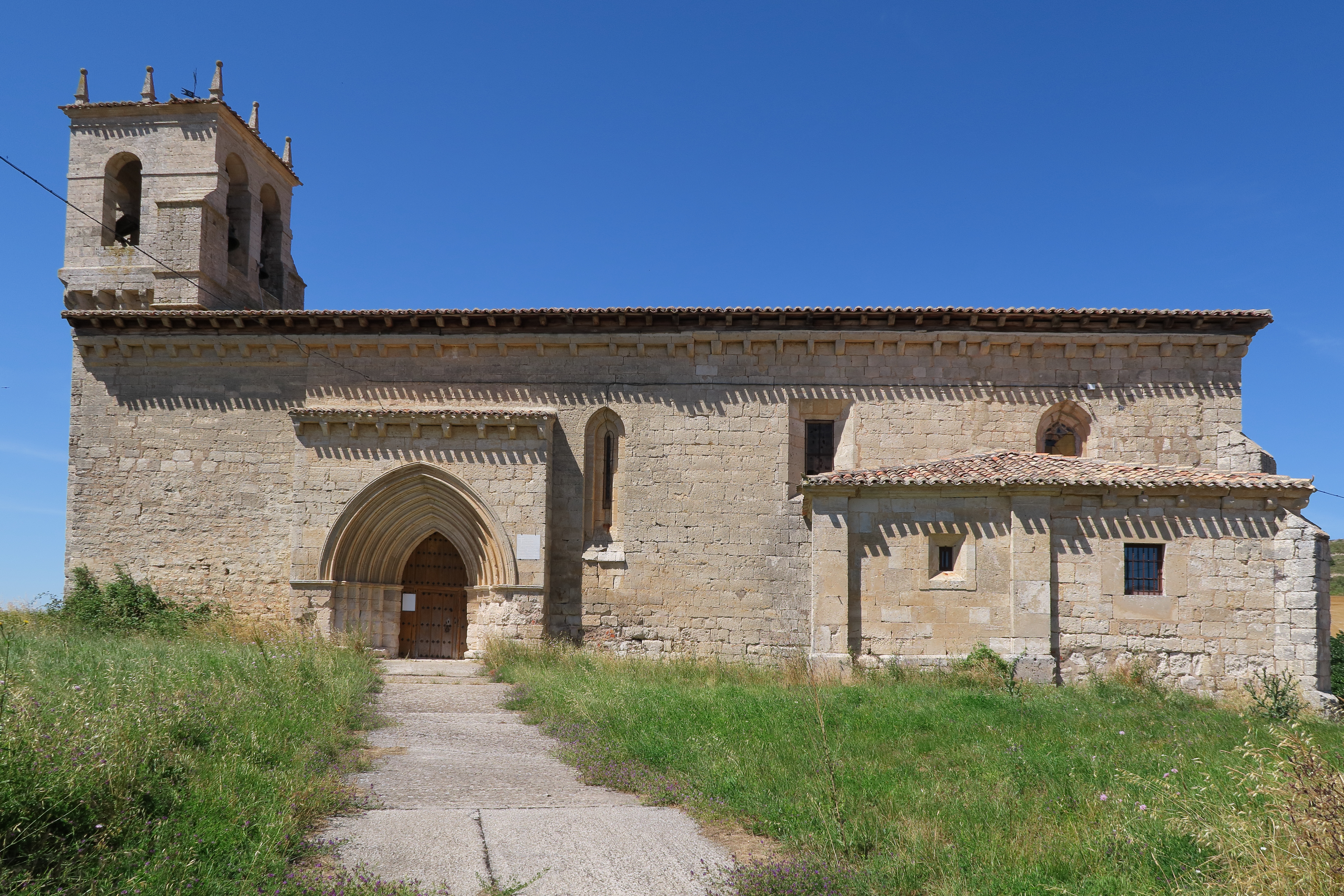 Iglesia de Nuestra Señora de la Asunción, Olmos de la Picaza, 03